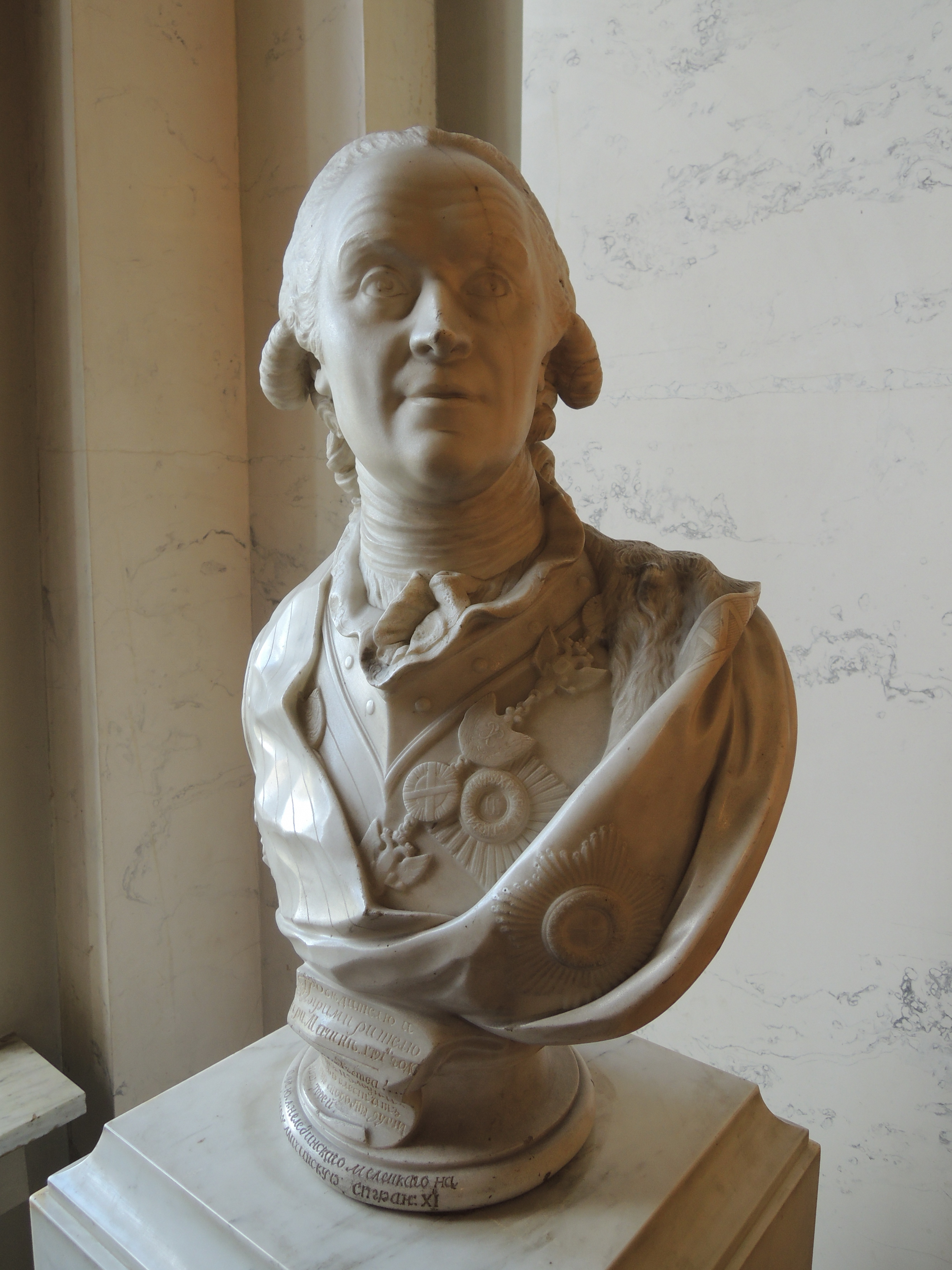 Бюст Николая Васильевича Репнина. Скульптор Федот Шубин. 1791. ГРМ